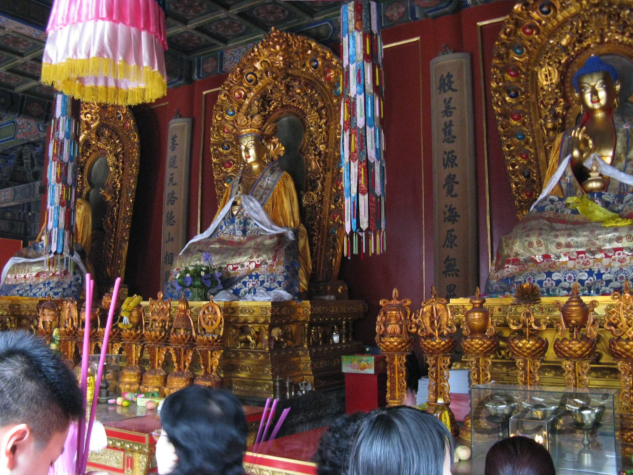 Lamatempel (Yong He Gong) - einer der Innenräume